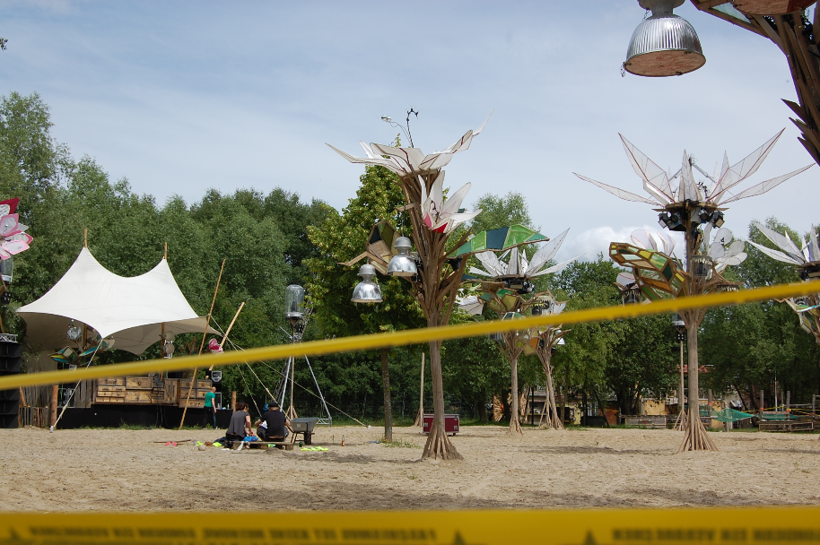 Fusion Festival 2014, Blick auf die Tanzwüste.